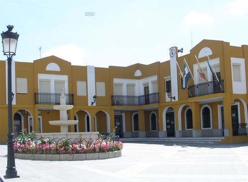 Ayuntamiento de Santa Marta